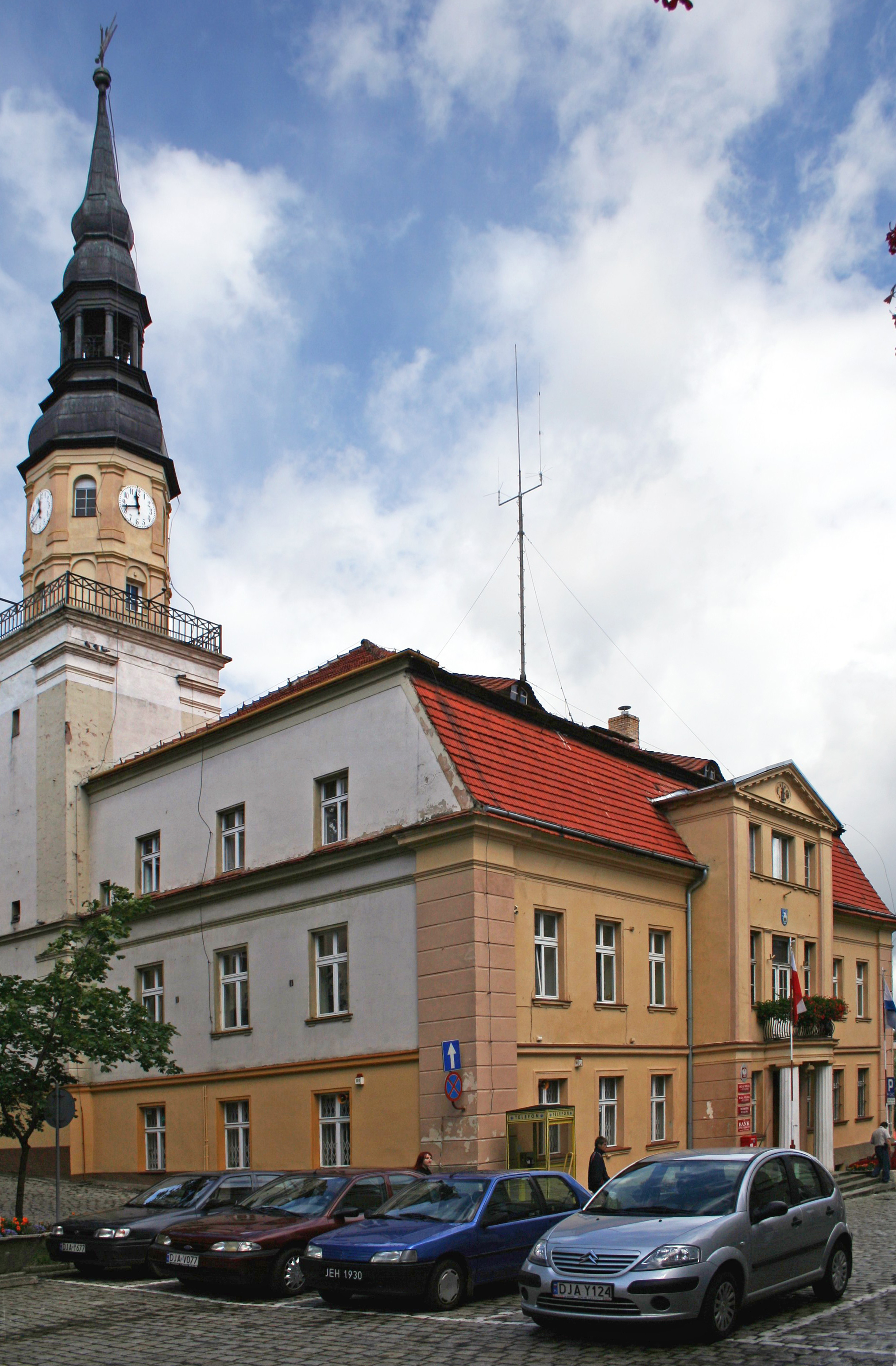 Bolków - ratusz, XVIII